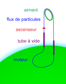 schéma d'une fontaine spatiale